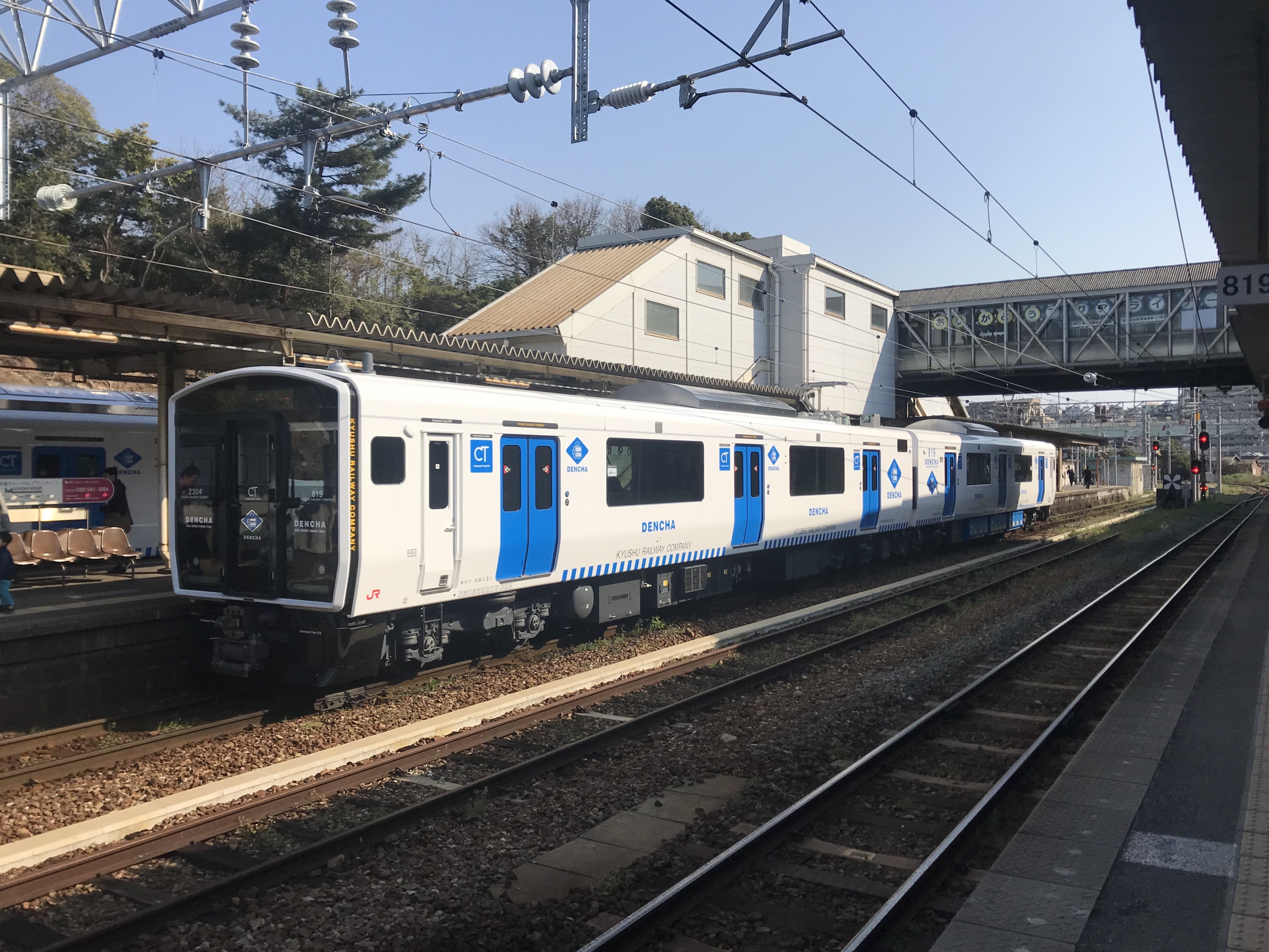 香椎駅に停車中の香椎線列車